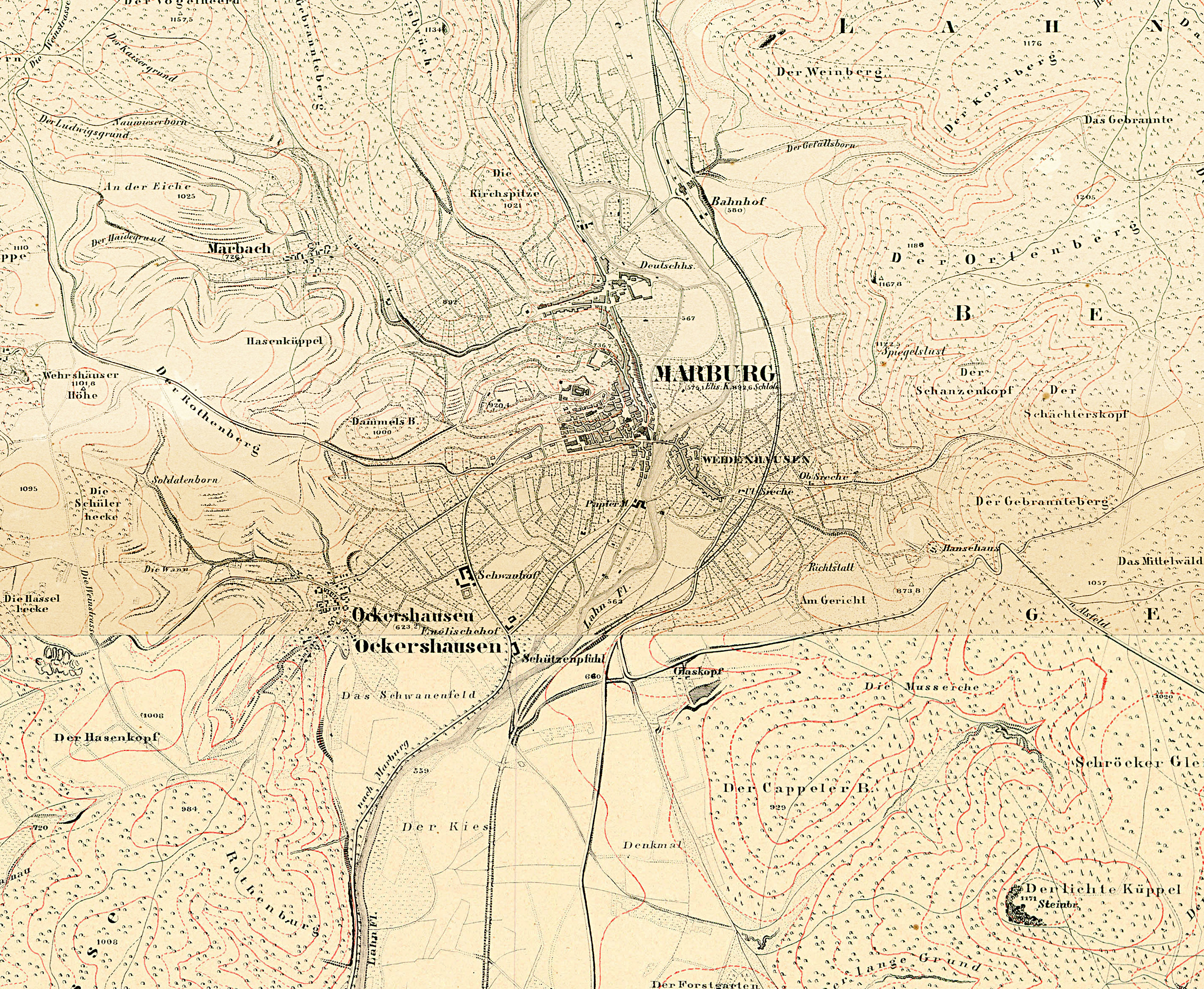 Topografische Karte der Stadt Marburg Marburg mit dem Gebiet des späteren Südviertels und Nordviertels (1:25000).